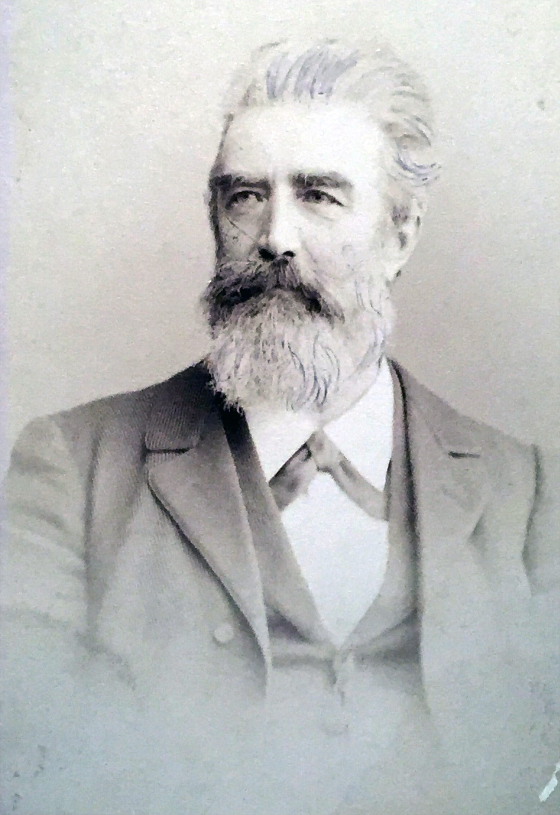 Porträtfotografie von Wilhelm Noeldechen als Corpsstudent in Leipzig